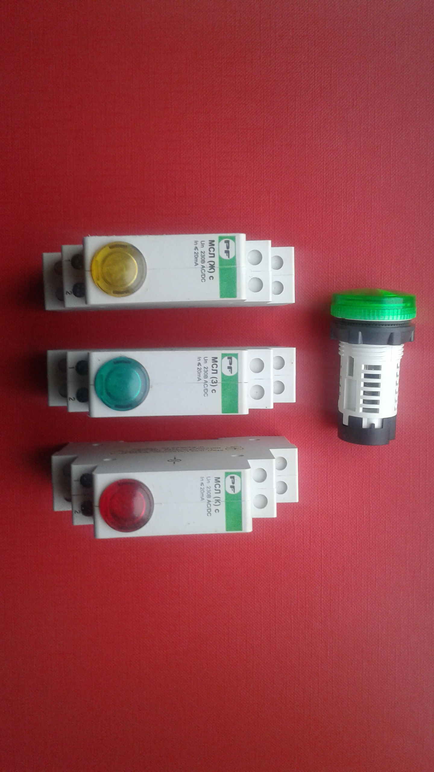 індикатори